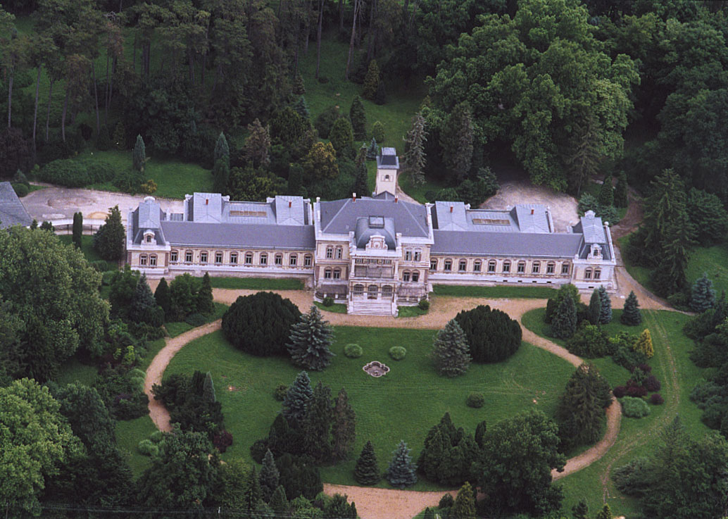 Biedermann-Palace - Szentegát - Hungary - Europe